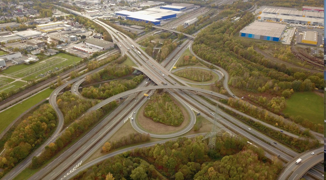 OW3 verläuft unter der B236